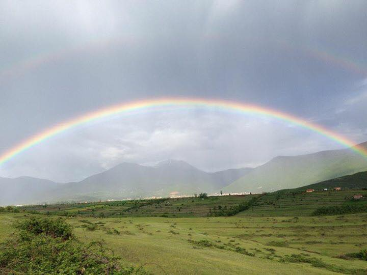 Nje peisazh madheshtor